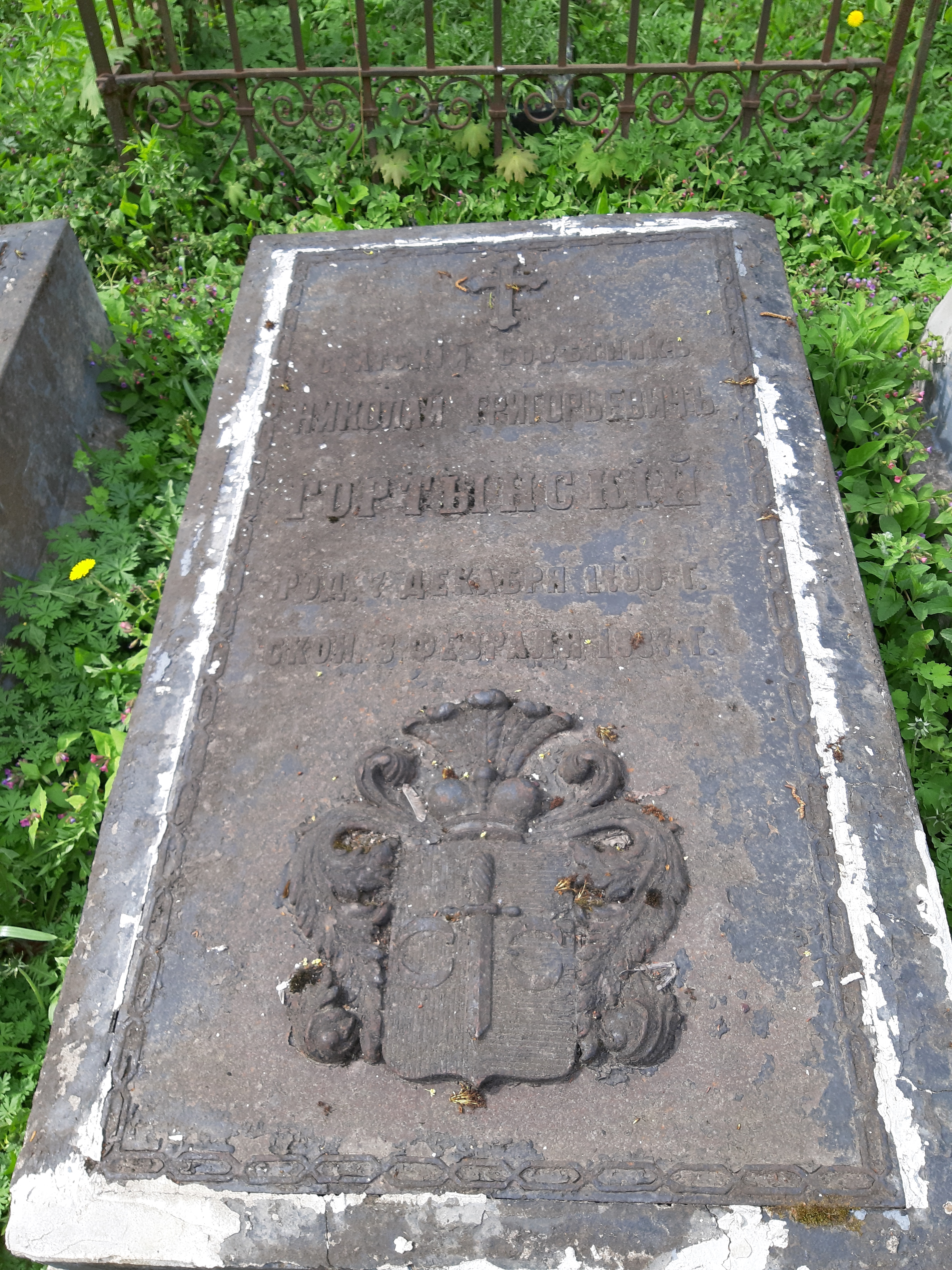 Магілёў. Успенскія могілкі